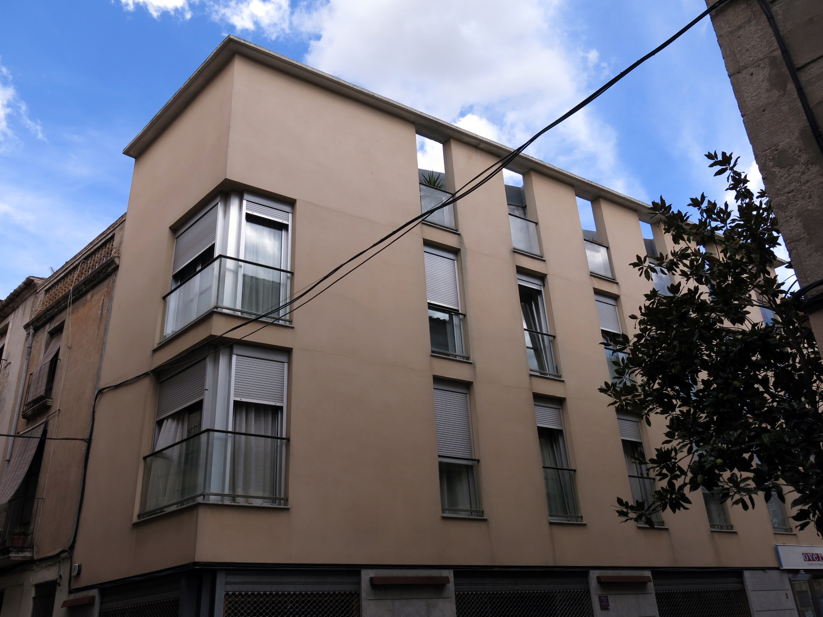 Nou edifici que ocupa el solar de l'habitatge de la plaça Llorens i Barba, 2 (Vilafranca del Penedès)